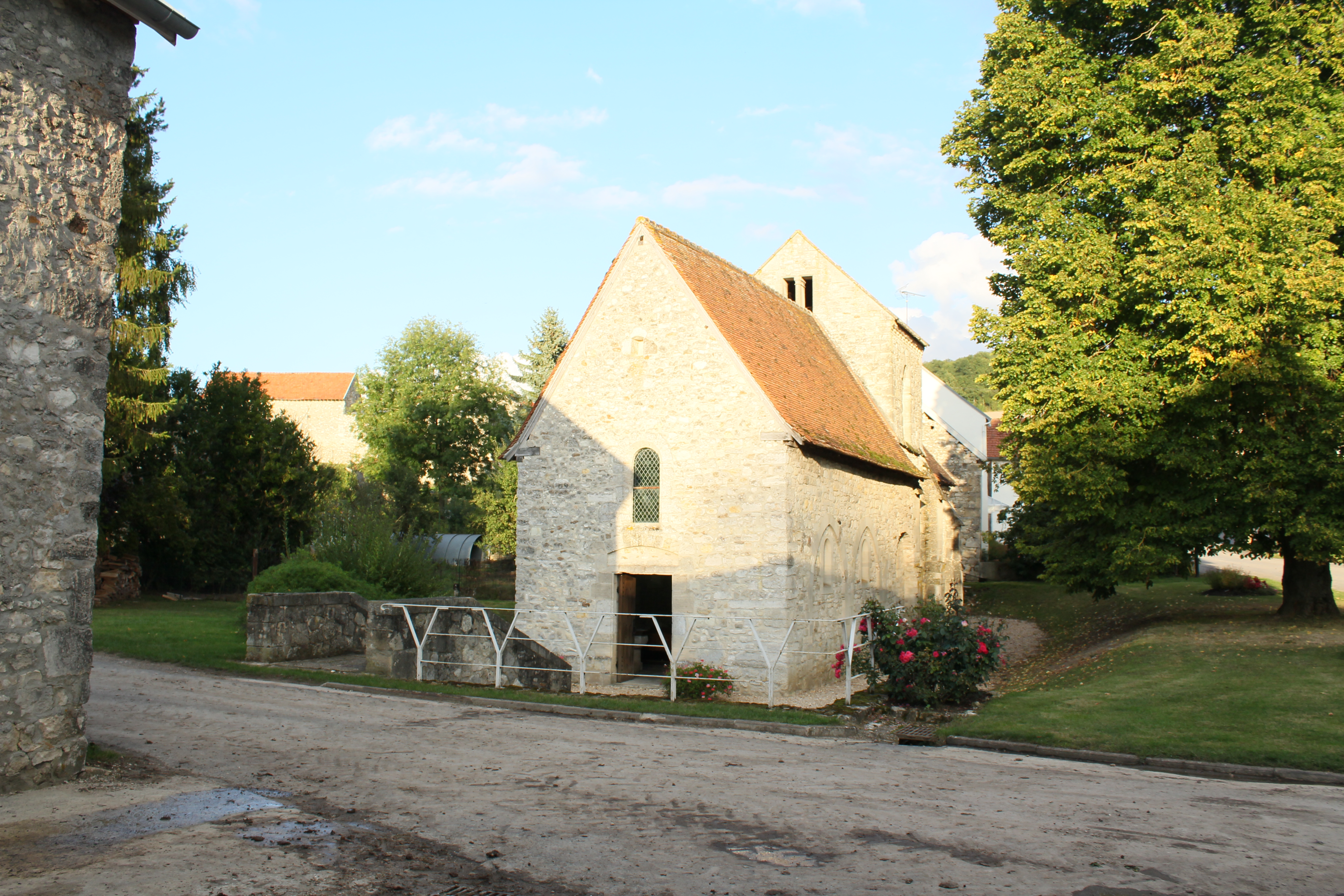 Église Saint-Martin de Jonquery, (Classé, 1919) .